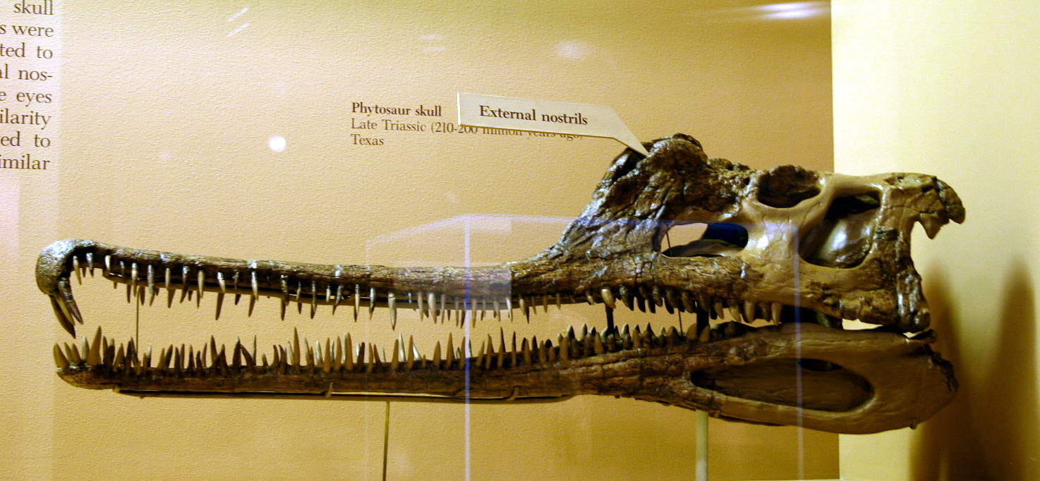 Phytosaur skull